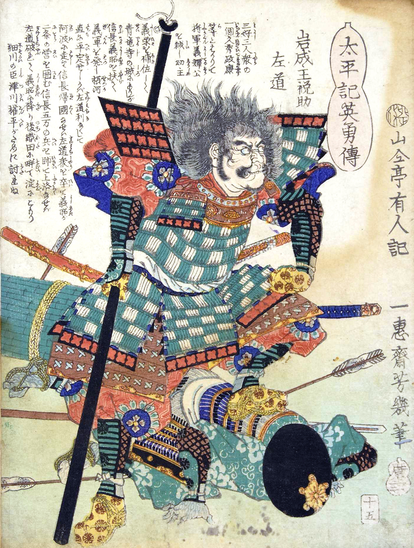 「太平記英勇伝十五：岩成主税助左道（岩成友通）」